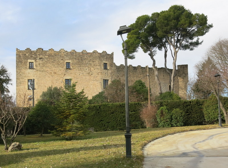 Castell de La Torre de Claramunt, comarca Anoia, Catalunya